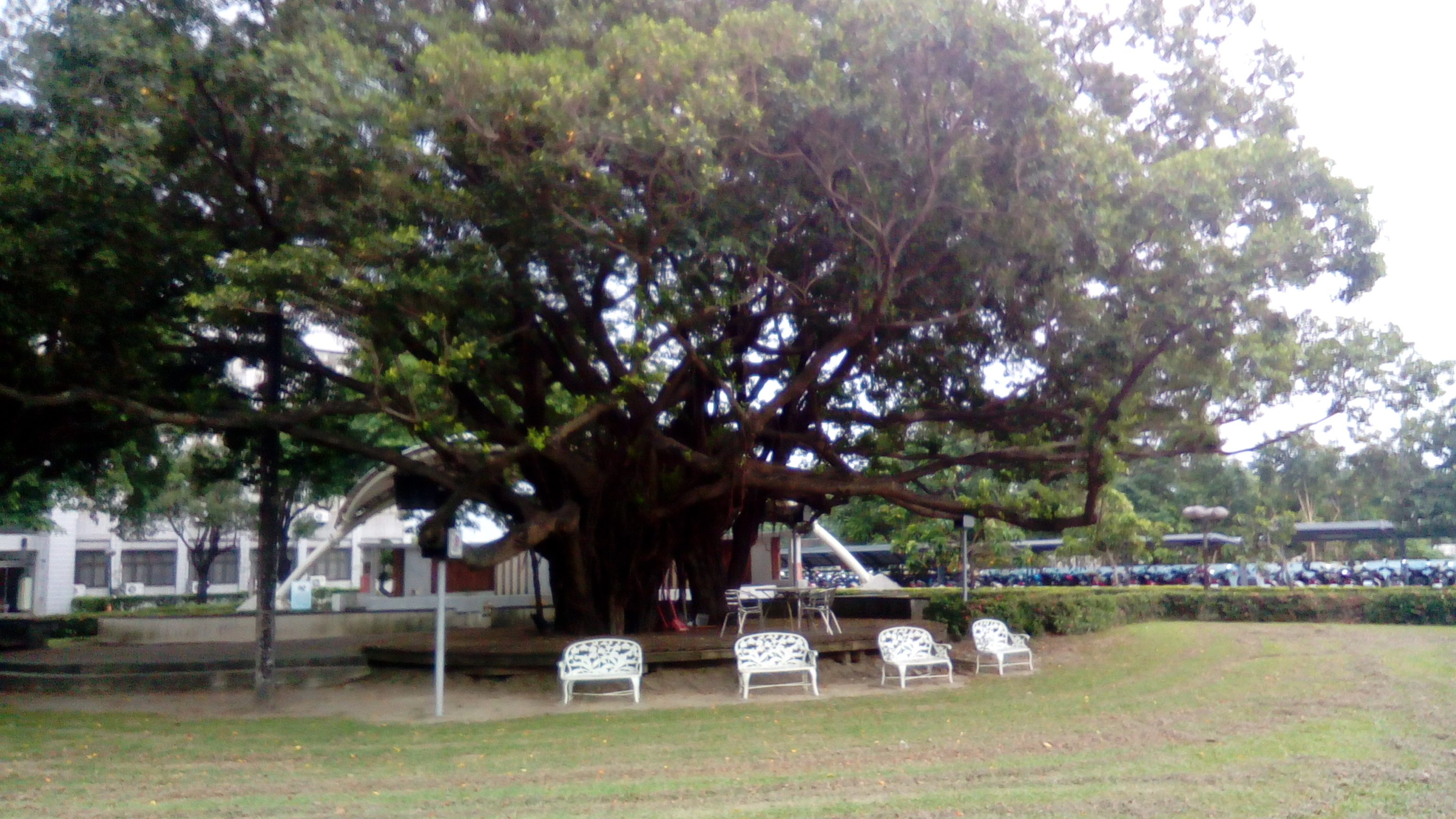 位於民生校區東側 教職員停車場旁